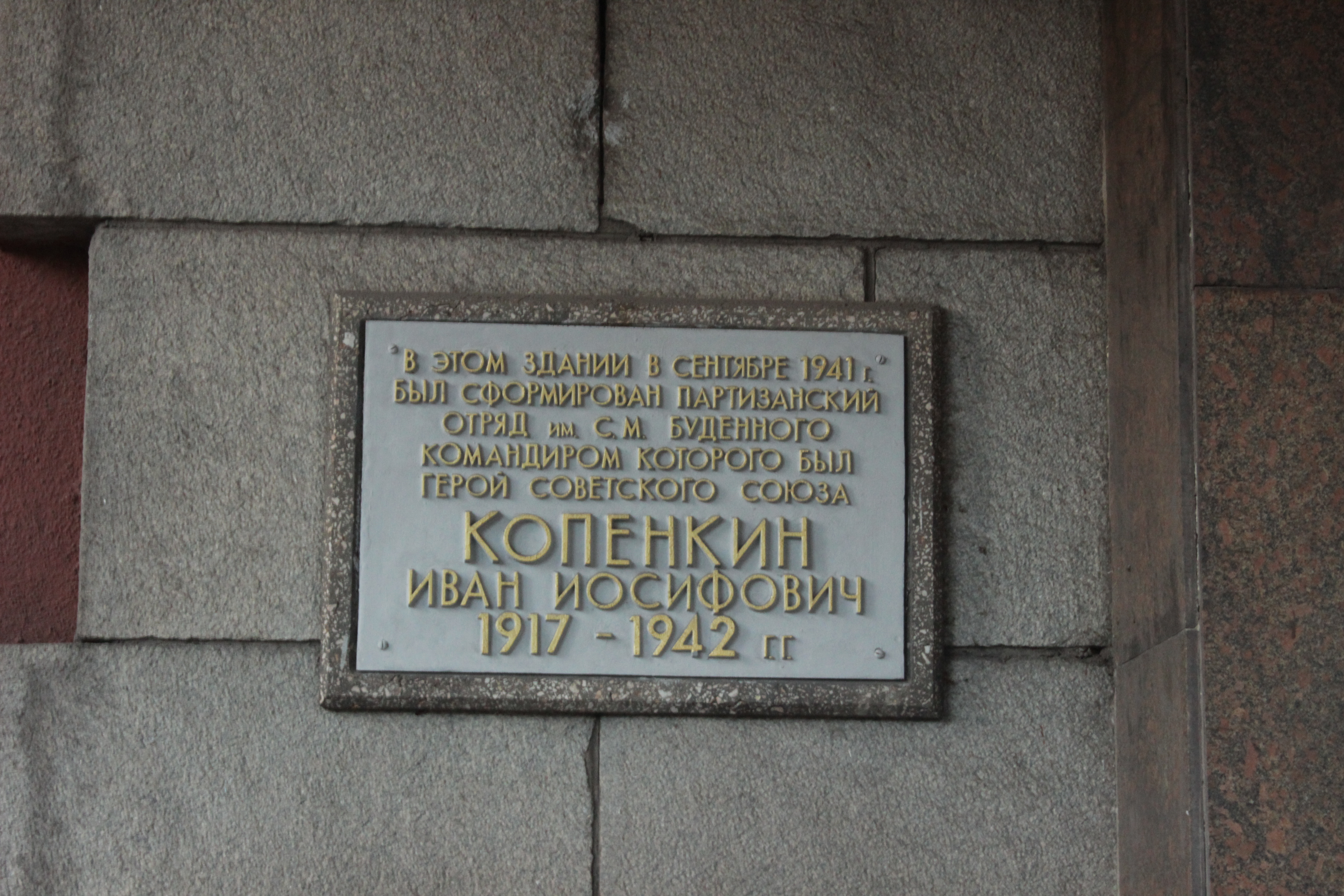 Будинок заводоуправління заводу "Запоріжсталь", в якому перебував Орджонікідзе Г. К. та працював Кузьмін А. М., Запоріжжя, Південне шосе, 72